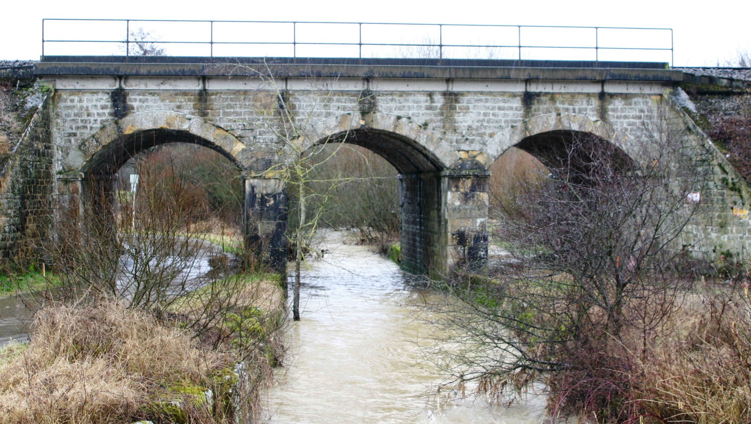 D'Äisch ënner den Dräibrécken zu Klengbetten no staarkem Reen am Februar 2008.